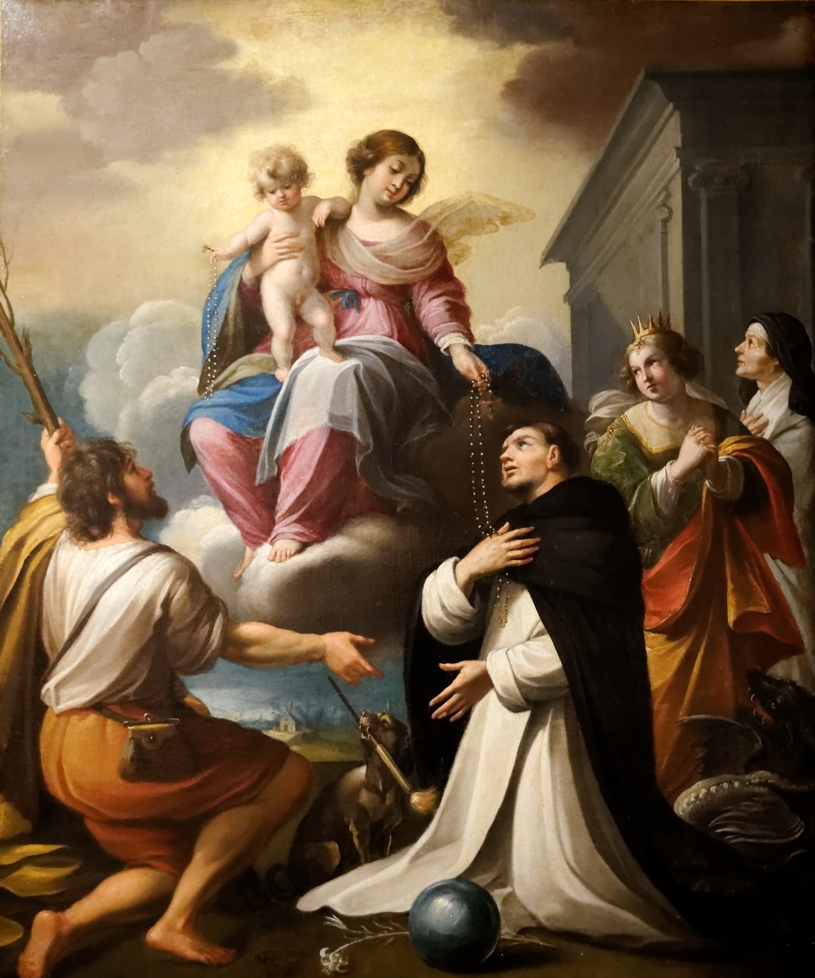 La remise du rosaire, Guillaume Perrier (Mâcon 1600 - Lyon 1656). Huile sur toile 110 x 92 cm. Acquis en 1979. Musée des ursulines de Mâcon. Inv 15111